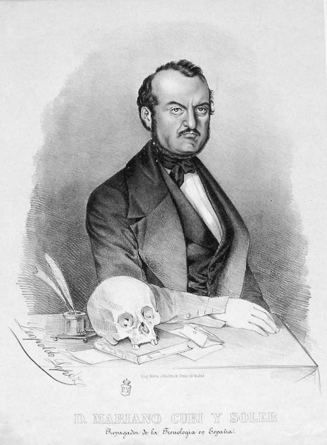 Mariano Cubí y Soler, propagador de la frenología en España, litografía de Leopoldo López de Gonzalo. Biblioteca Nacional de España.